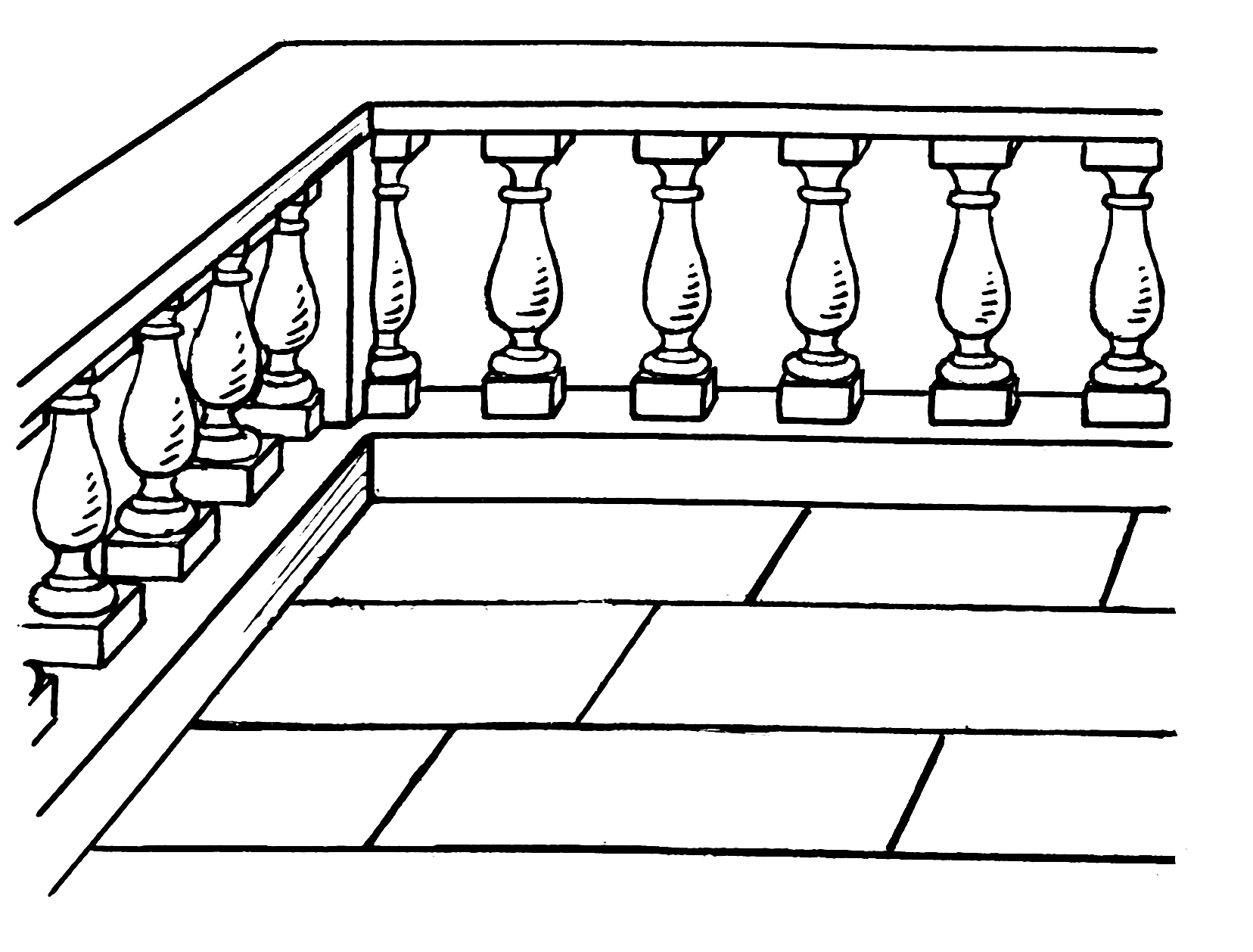 Balustrade